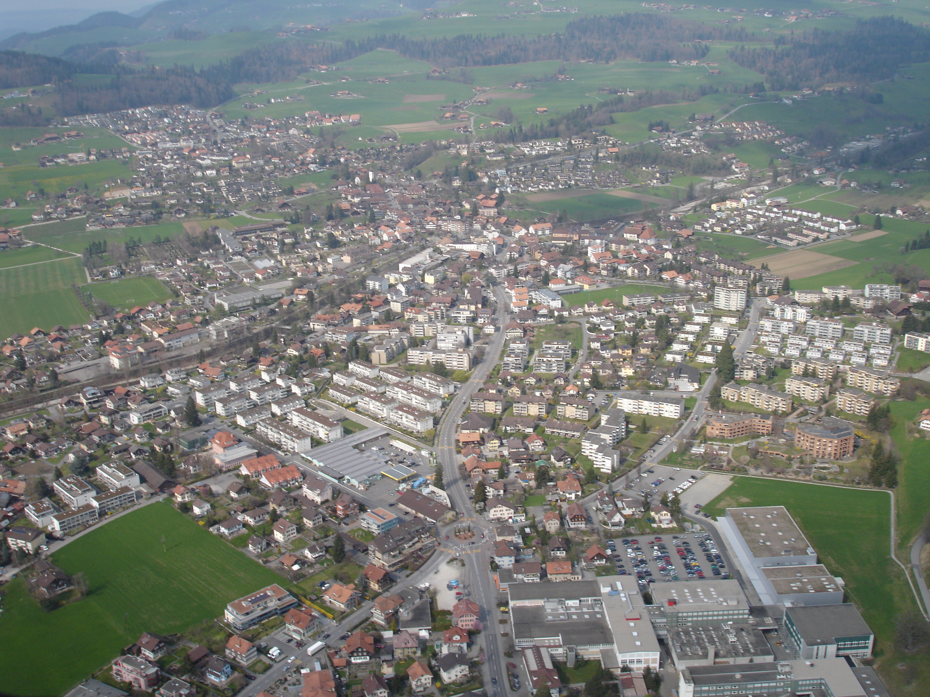 Luftaufnahme von Steffisburg